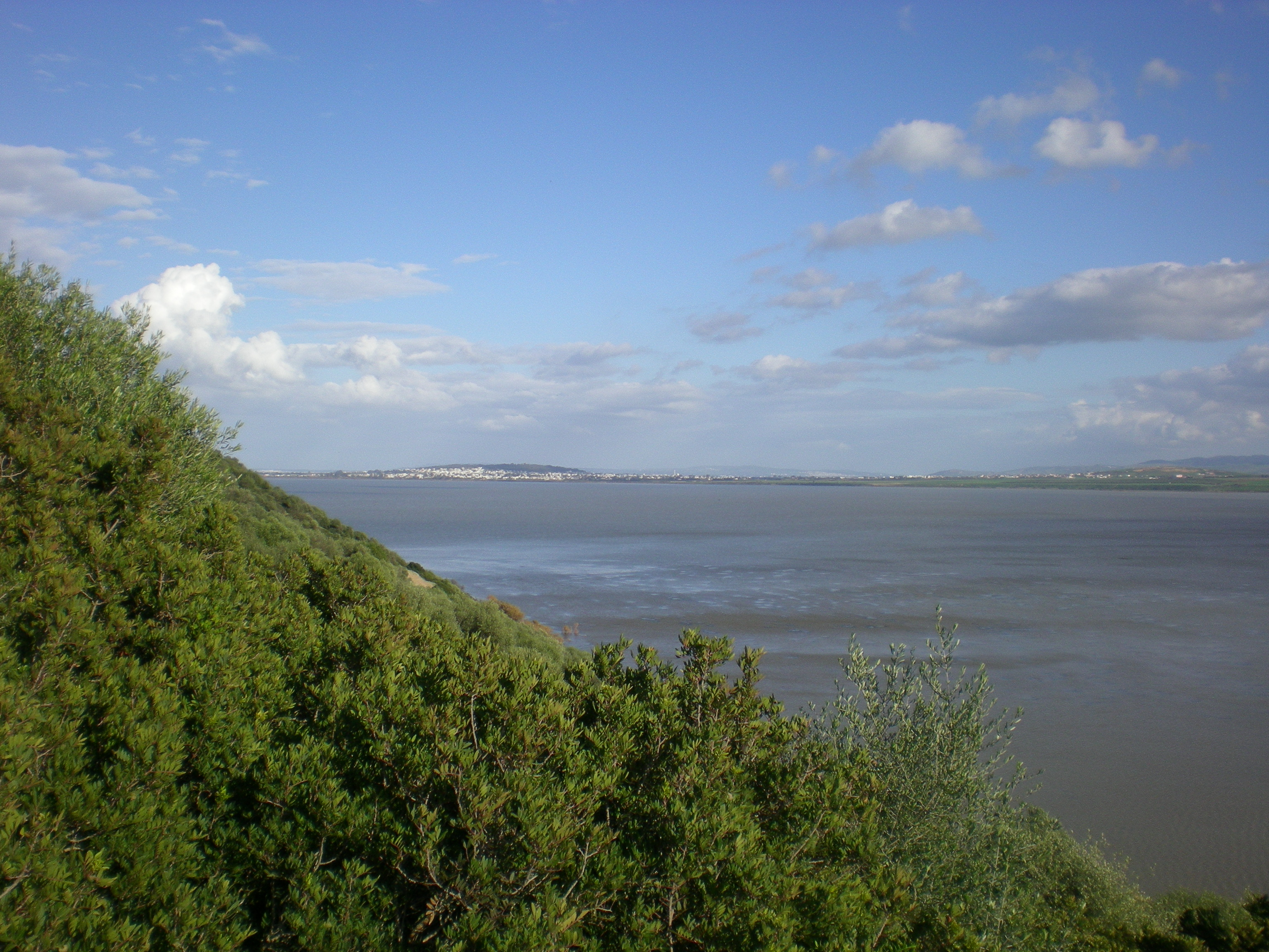 Parc naturel tunisien